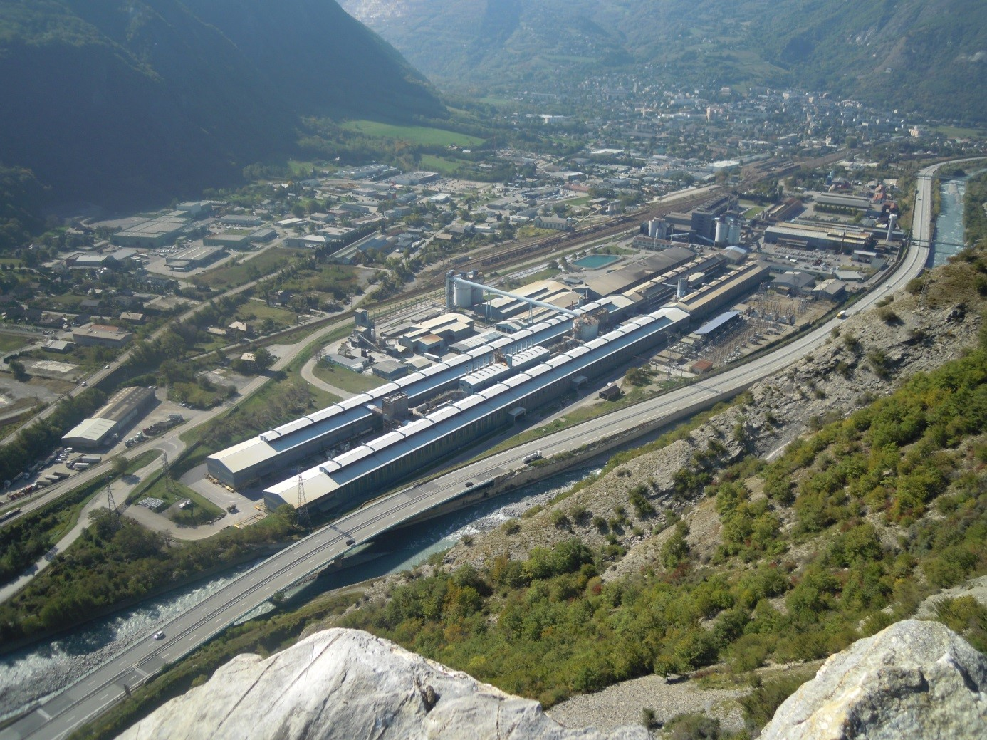 L'usine d'aluminium de Trimet dans le quartier des Plans, en 2018.